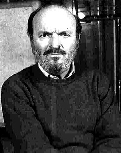 l'attore e doppiatore Omero Antonutti